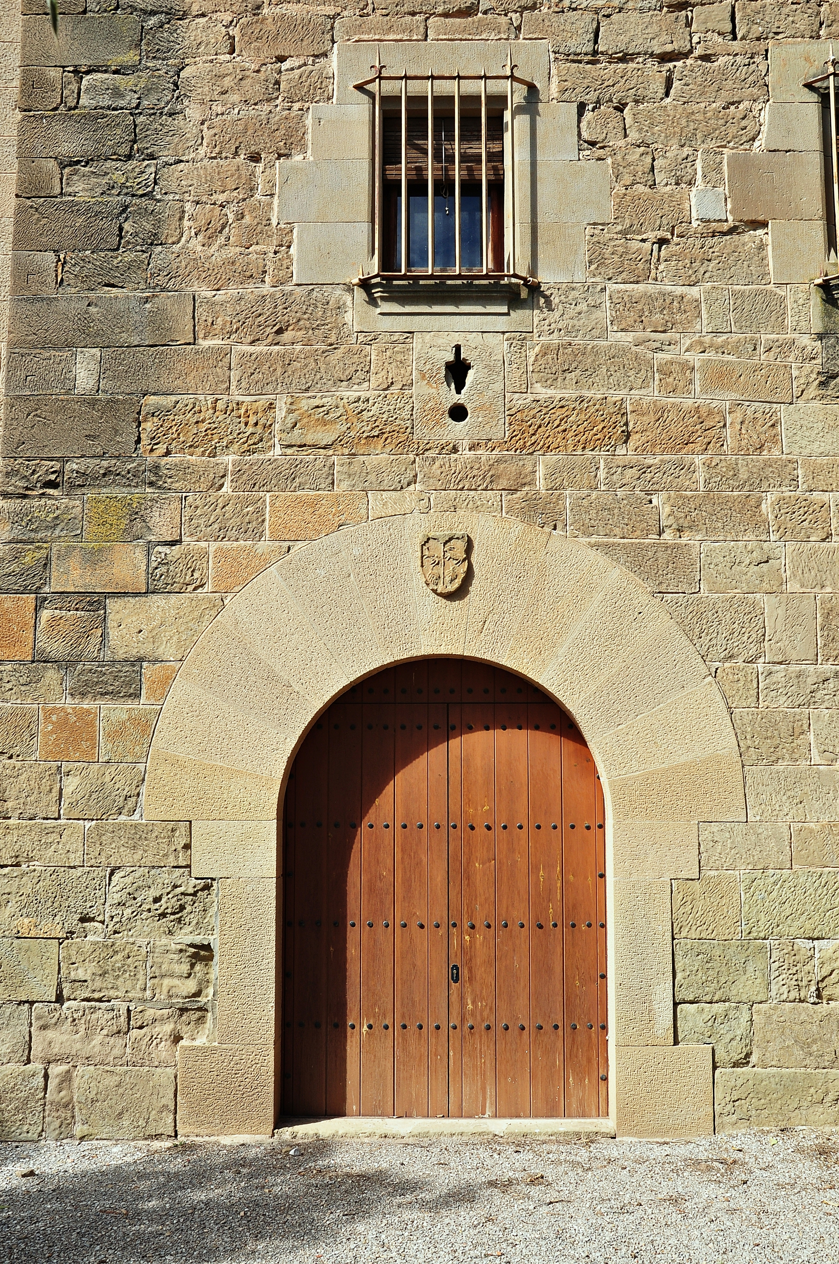 la Segarra-2015